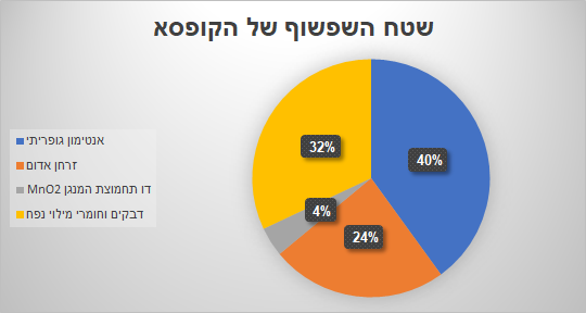 תרשים שטח הקופסא